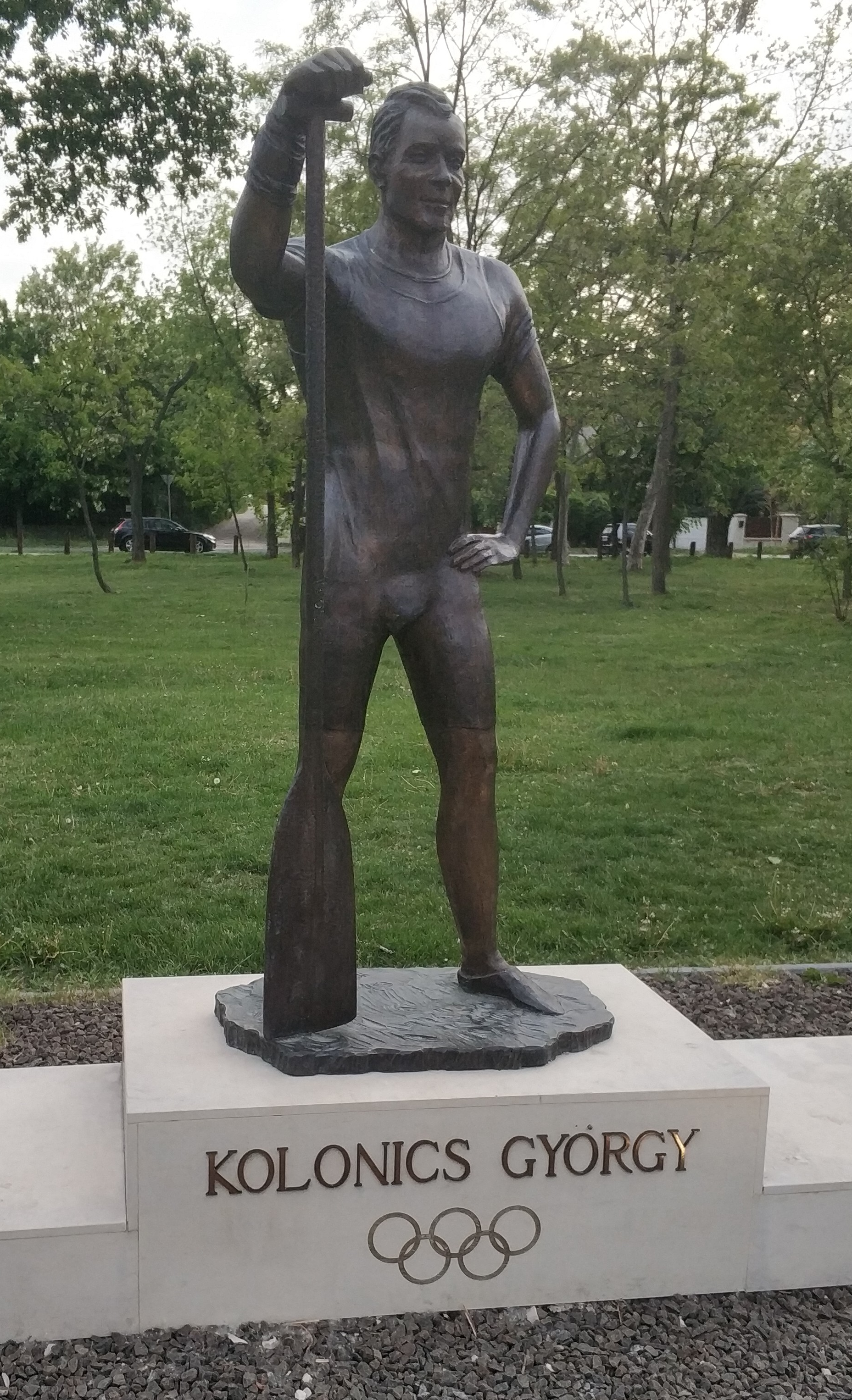 Kolonics György olimpiai bajnok kenus szobra Csepel, Dunapart, Kolonics György sétány szobor alkotója; Sárossy Tibor